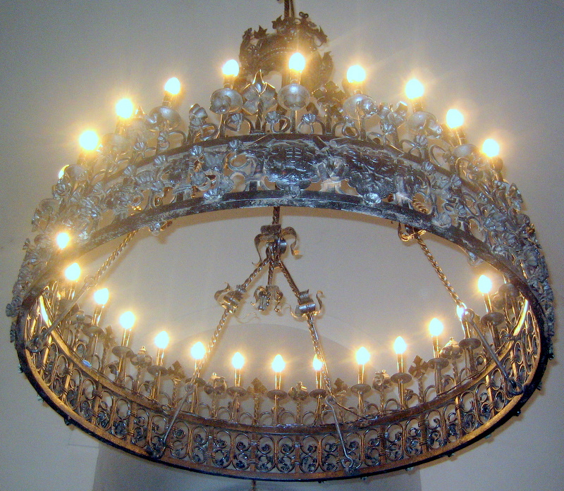 Беларуская (тарашкевіца): Крошын